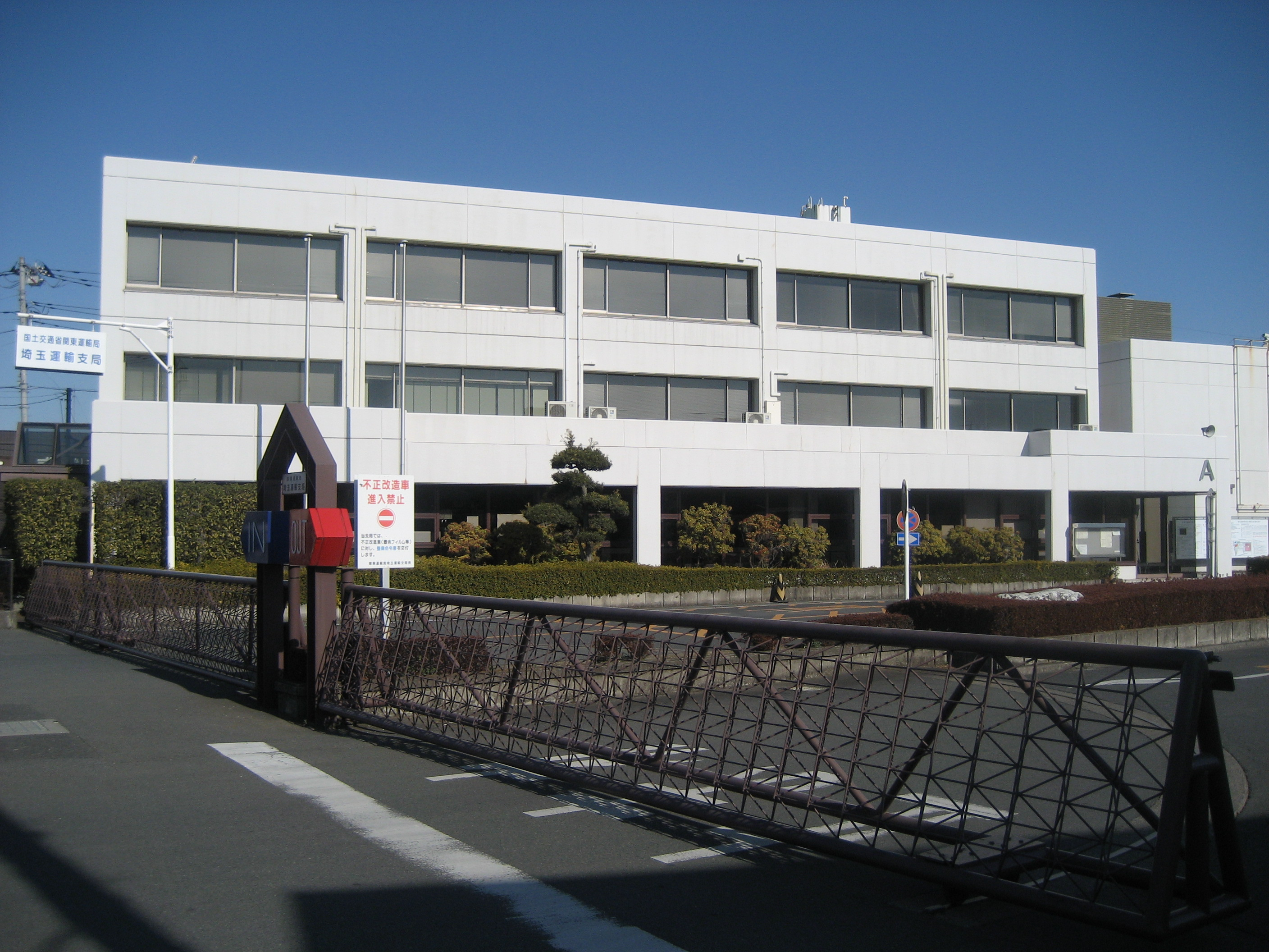 さいたま市西区にある埼玉運輸支局庁舎